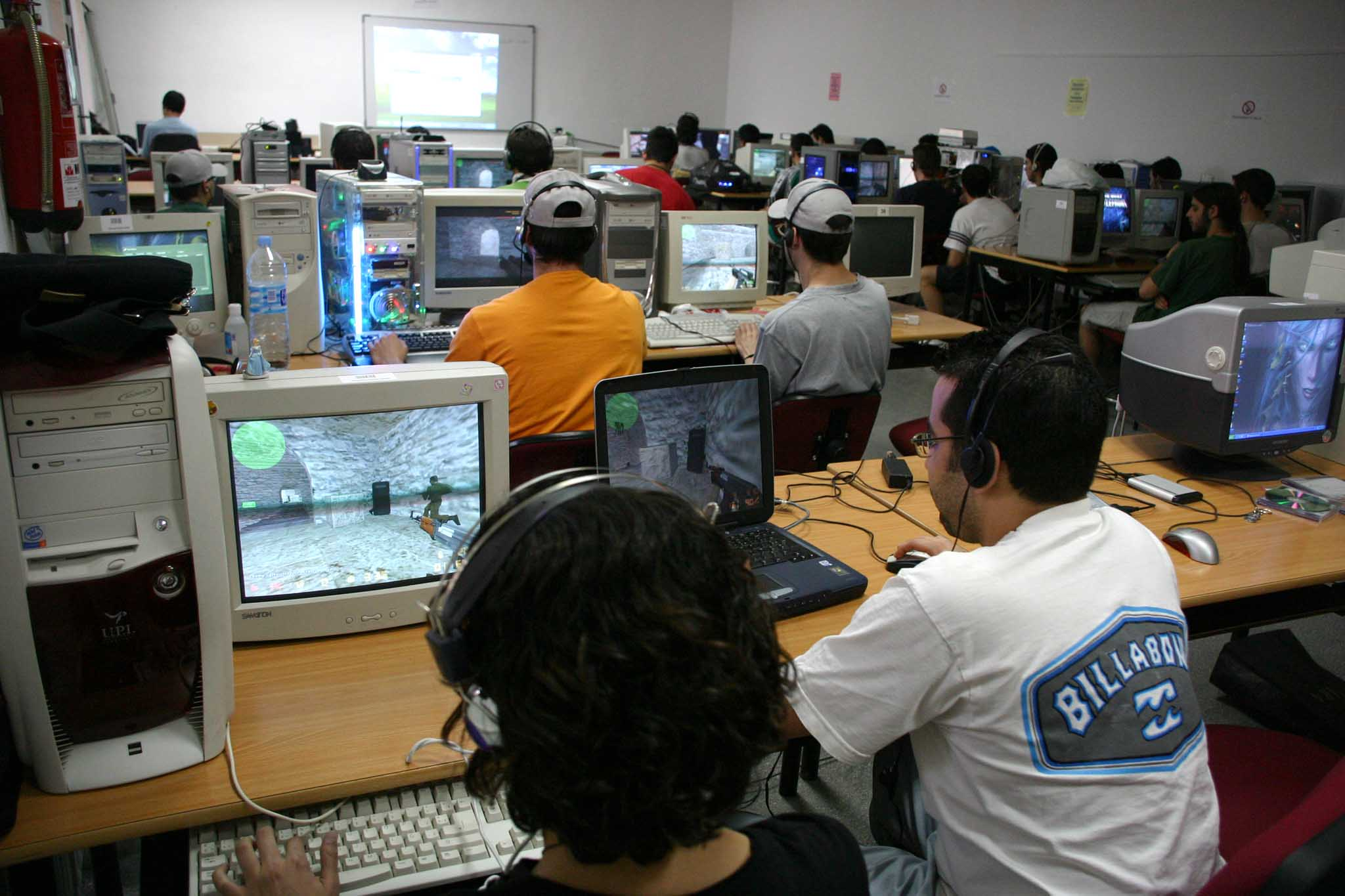 Linares Party 2005 celebrada en la EPS de Linares